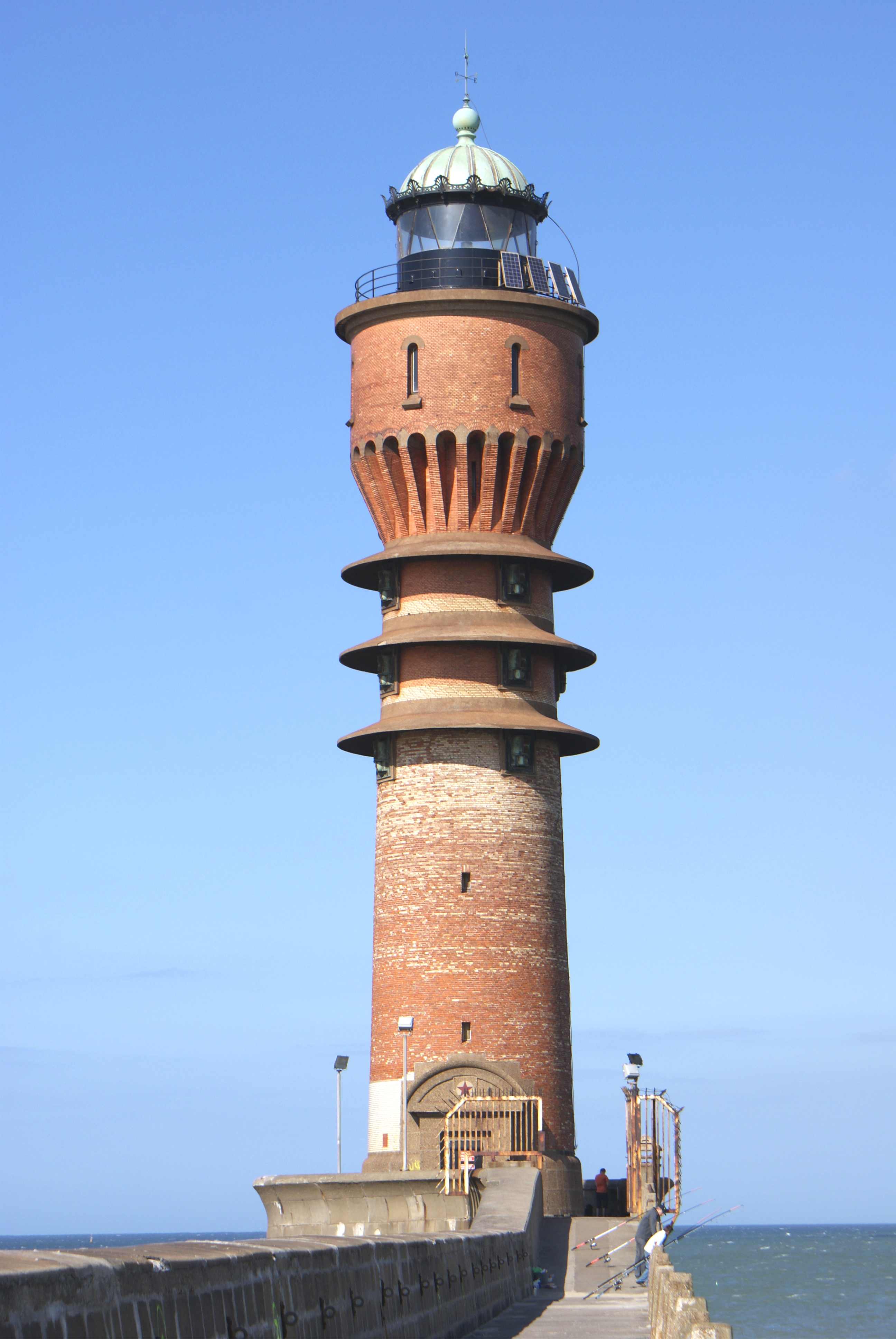 Le feu de Saint-Pol, à Dunkerque (Nord, France).